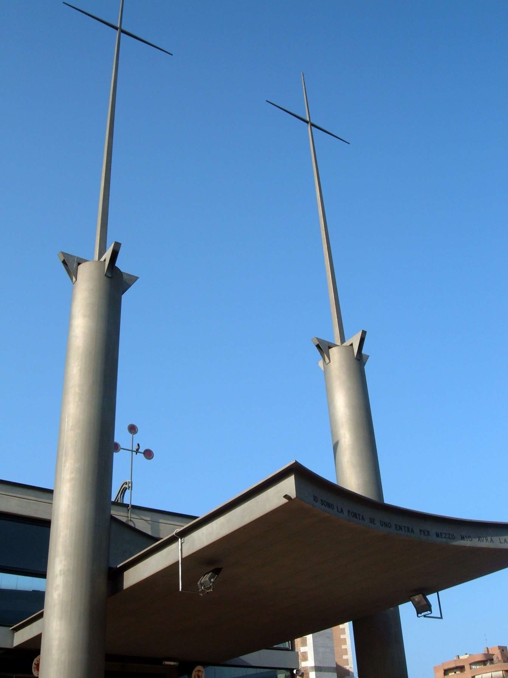 Chiesa di San Liborio, a Roma, nel quartiere Monte Sacro Alto, in via Diego Fabbri.